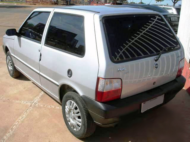 Late model Fiat Mille Fire (Brazil)